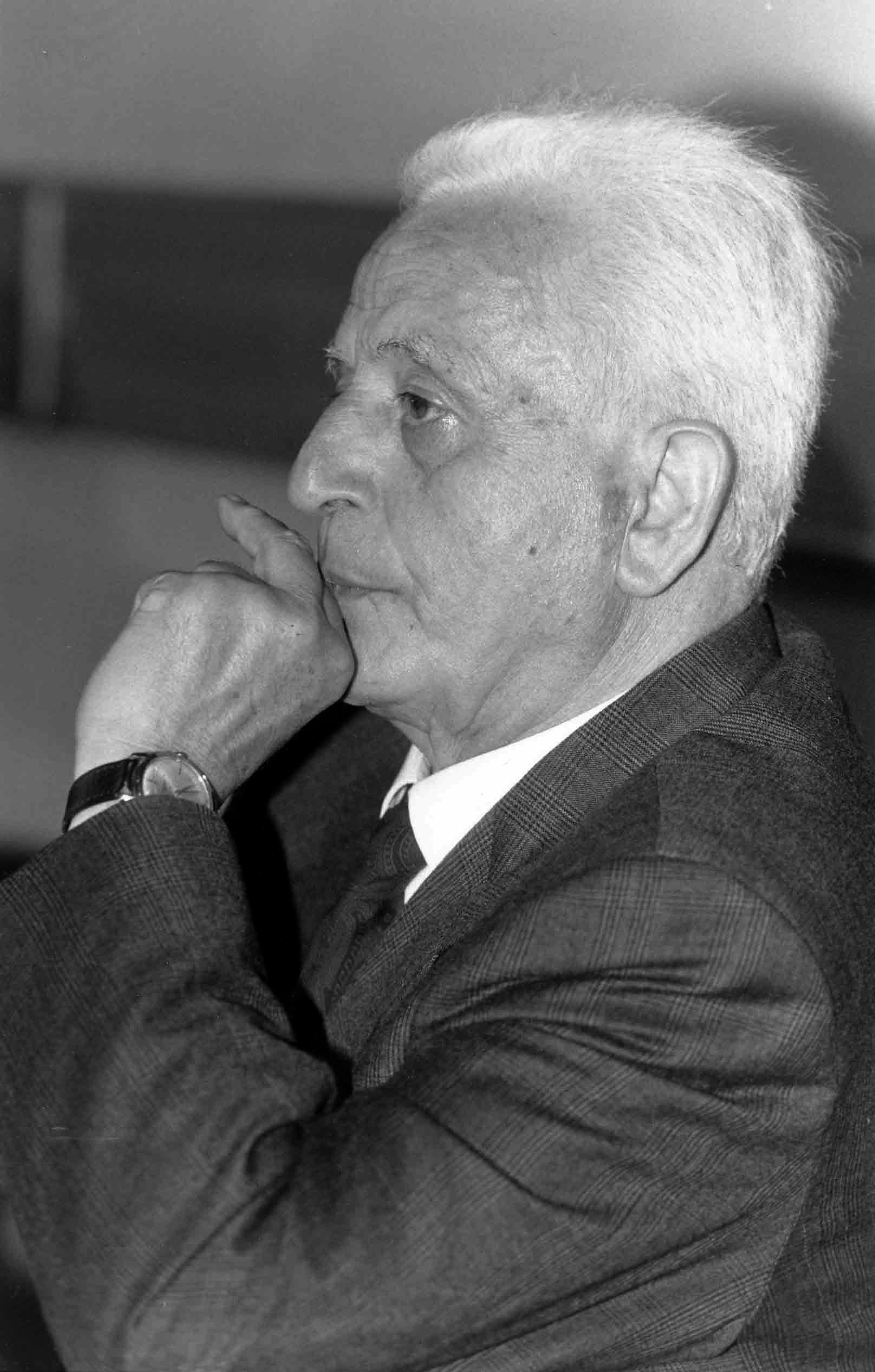 Matteo Perrini (1997)